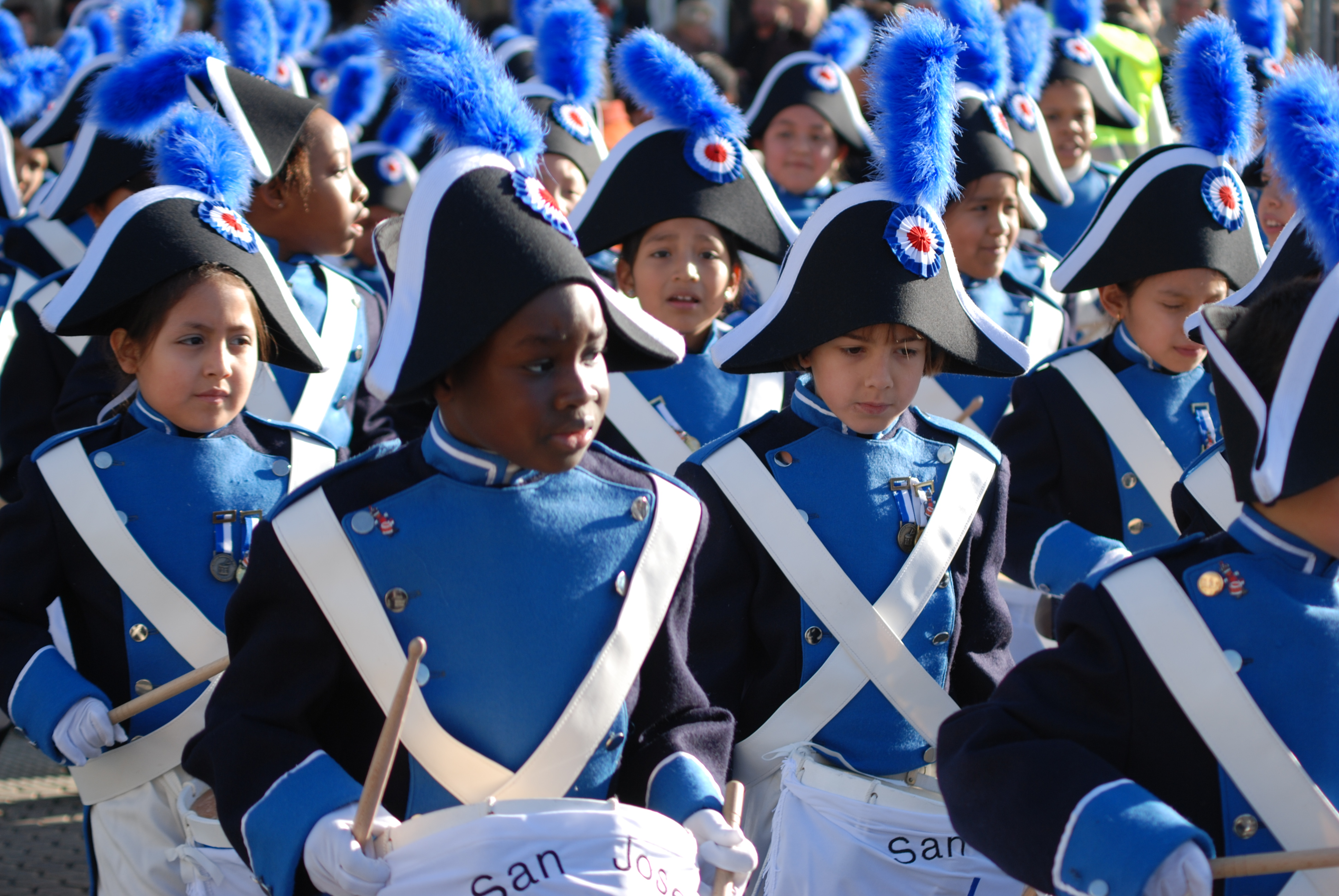 San Jose ikastetxeko haurrak Donostiako haur danborradan, 2008.